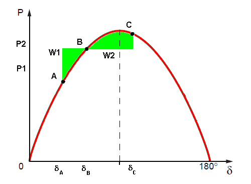 2nd illustration du thèorème de l'égalité des aires pour un générateur électrique synchrone